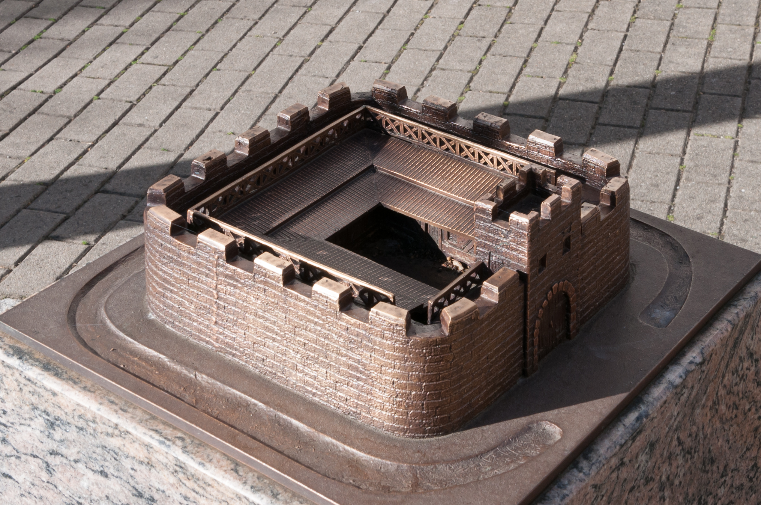 Rekonstruktionsversuch des Kleinkastells am Kirchplatz in Sindringen